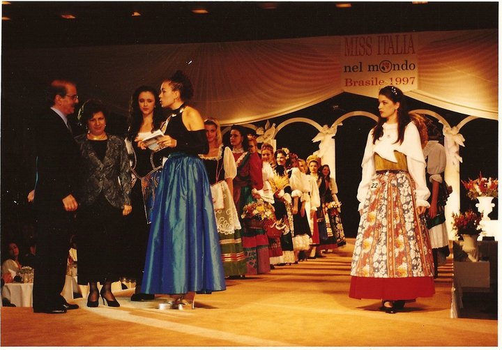 Noite de apresentação do concurso Miss Itália Nel Mondo para eleger a finalista que iria representar o Brasil no concurso Internacional na Itália. Apresentadores: Ana Paula Pereira e Sebastiano Soma.